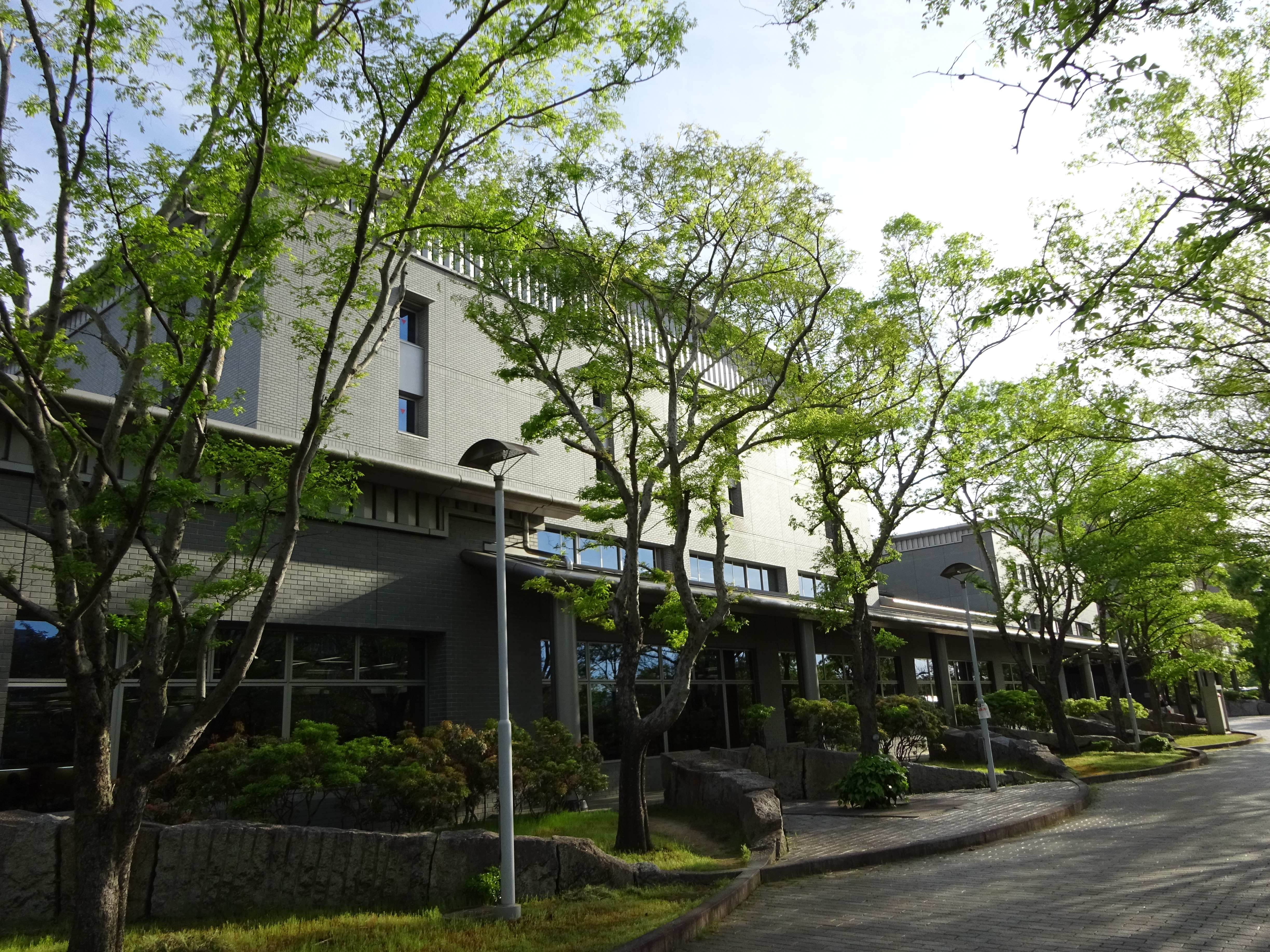 香川県立図書館と香川県立文書館の外観